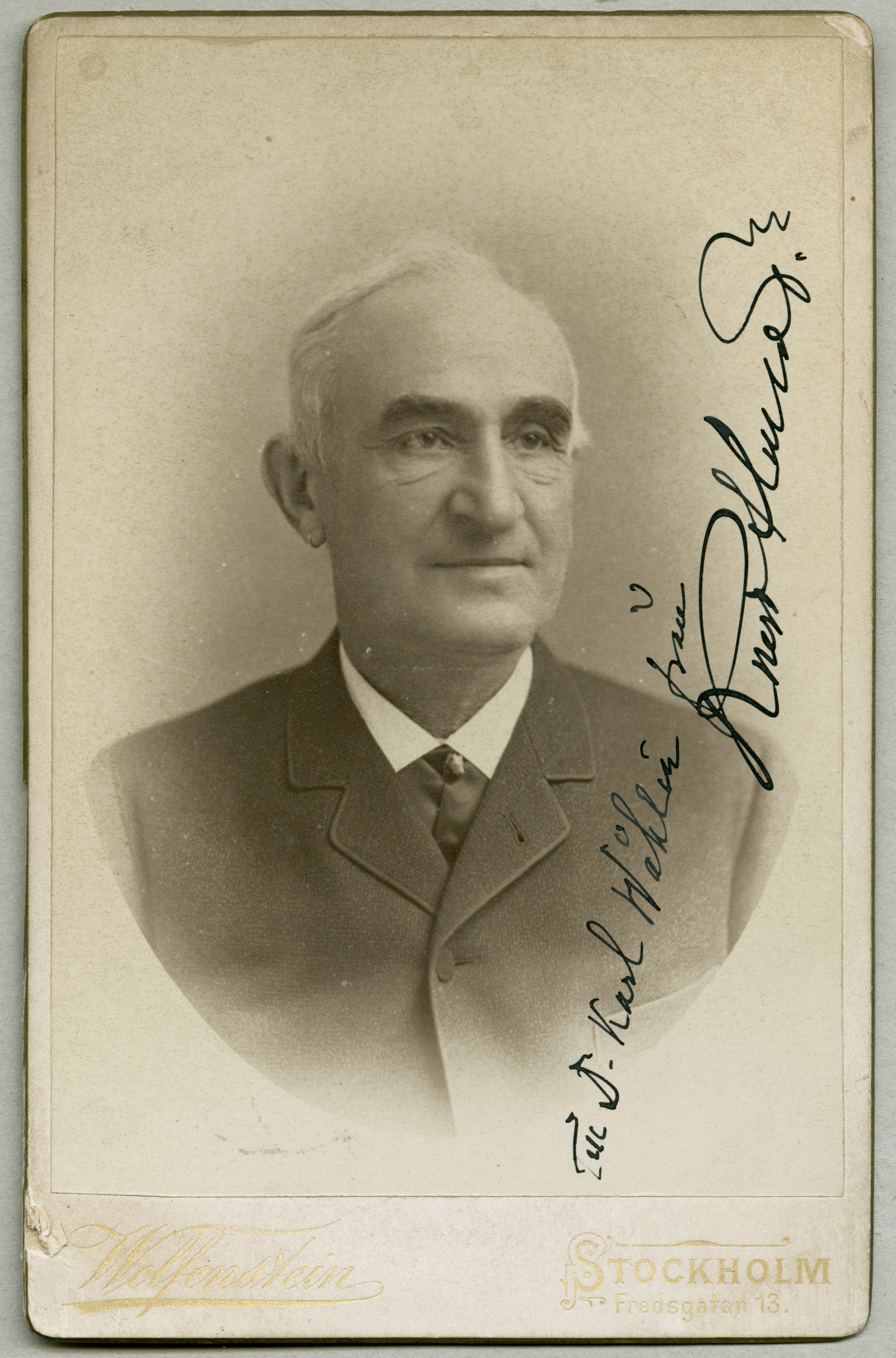 Knut Almlöf (1829-1899)